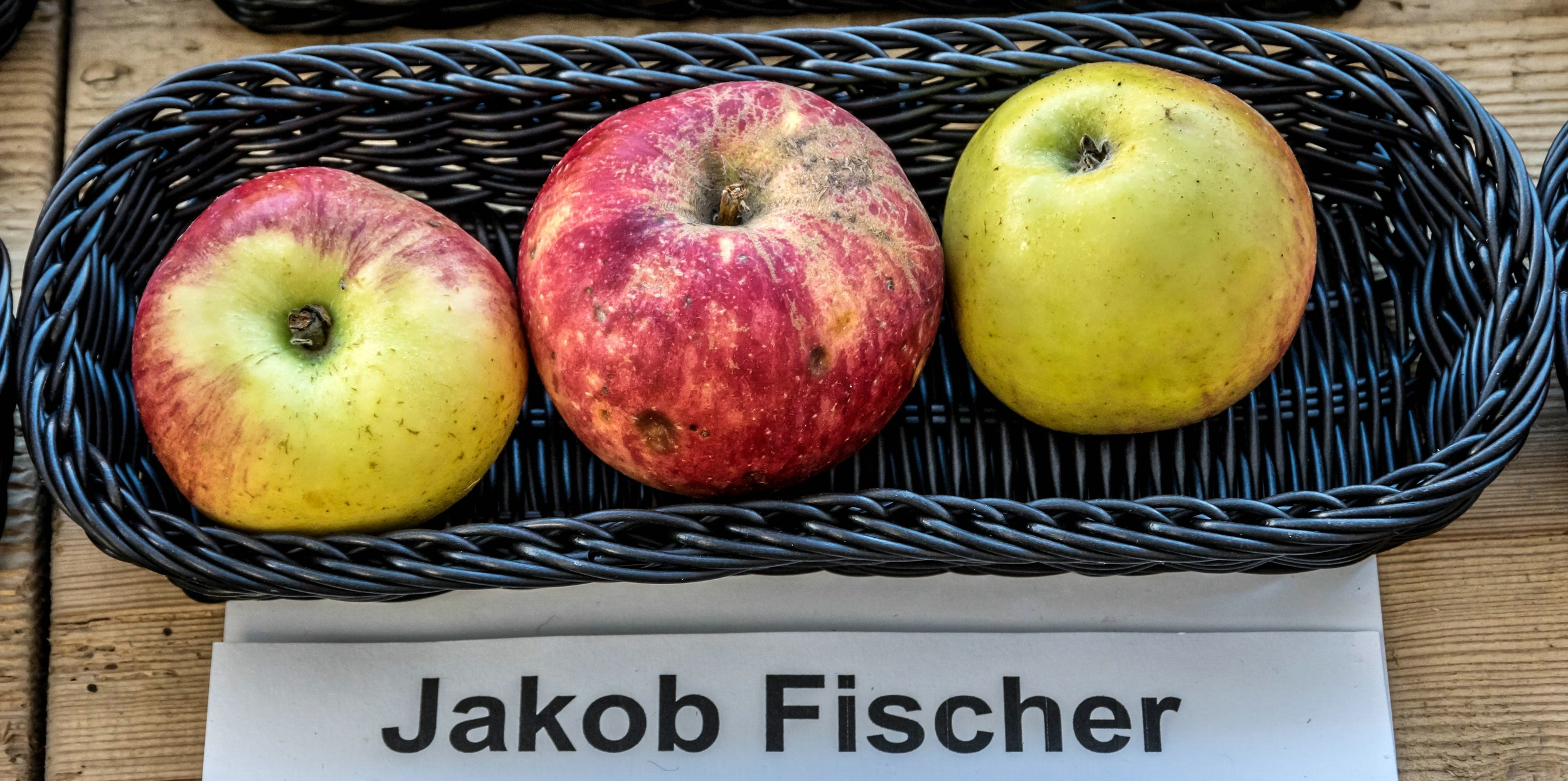 Alte Apfelsorten, von denen es im Badischen noch tragende Bäume gibt. Alle Aufnahmen au dem Oktober 2015